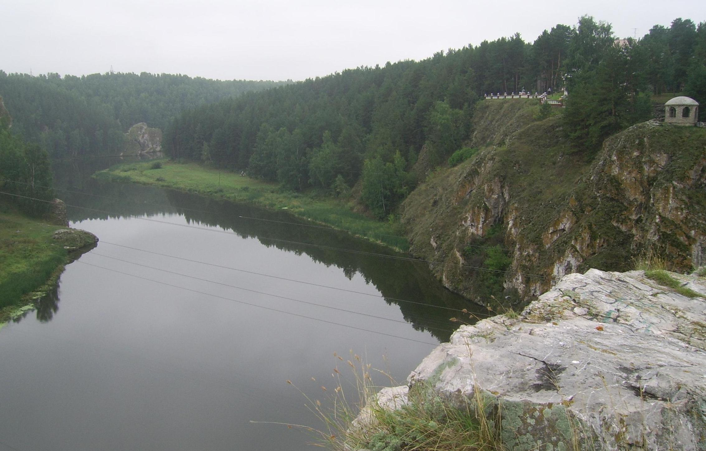 Gezicht over de Iset vanaf de rots 'Drie Grotten' (tri pesjtsjery) nabij Kamensk-Oeralski